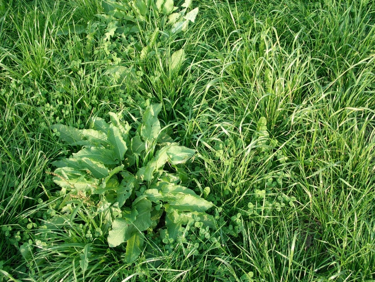 Krautreiches Wirtschaftsgrünland (Aspekt)